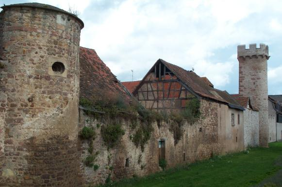 Une portion du mur d'enceinte et sa tour de la ville d'Obernai en Alsace, France